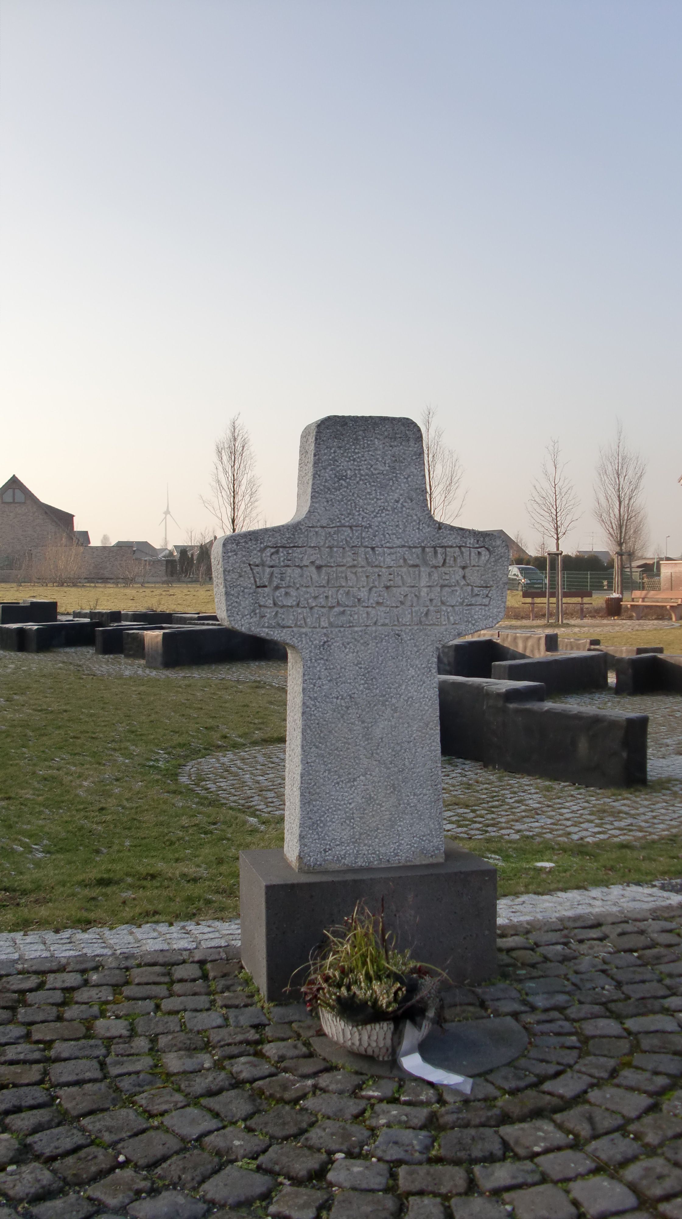 Das Kriegerdenkmal aus Alt-Holz fand in Neu-Holz seinen neuen Platz.